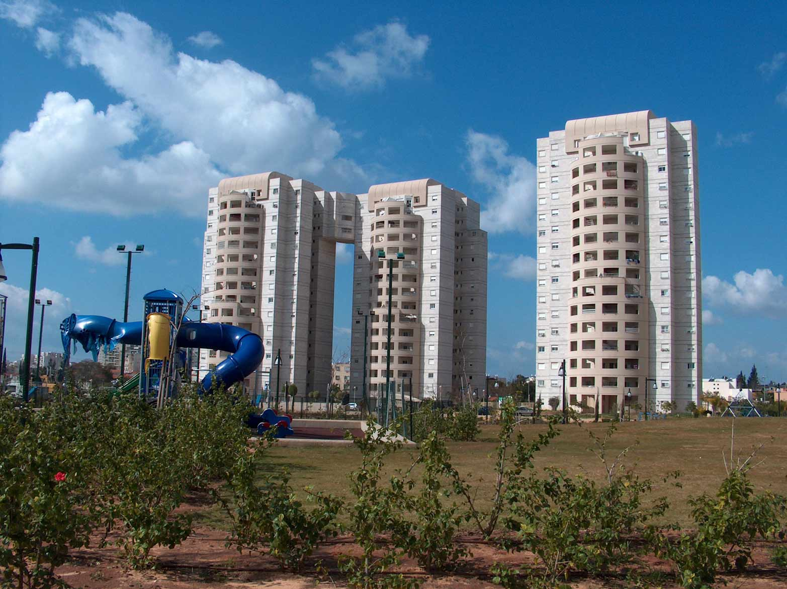 Buildings in Or Yehuda (Israel)